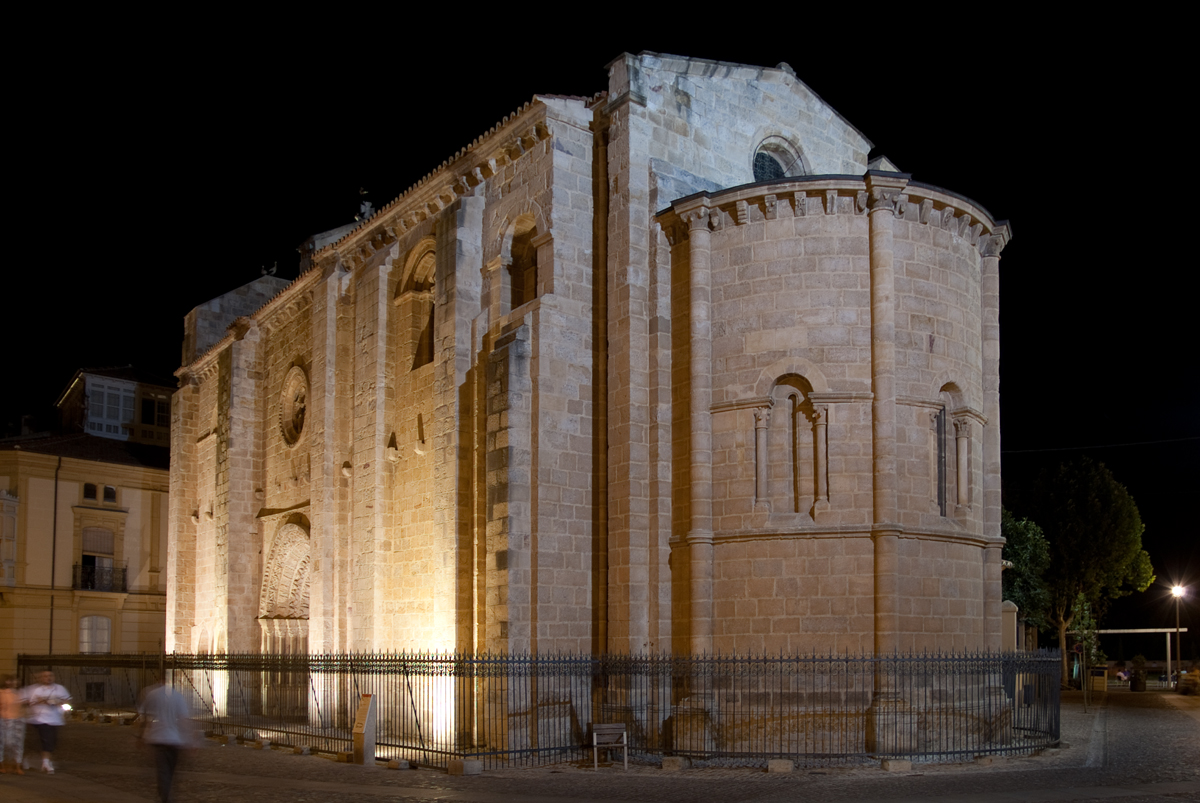 Vista nocturna de la Iglesia de Santa María Magdalena